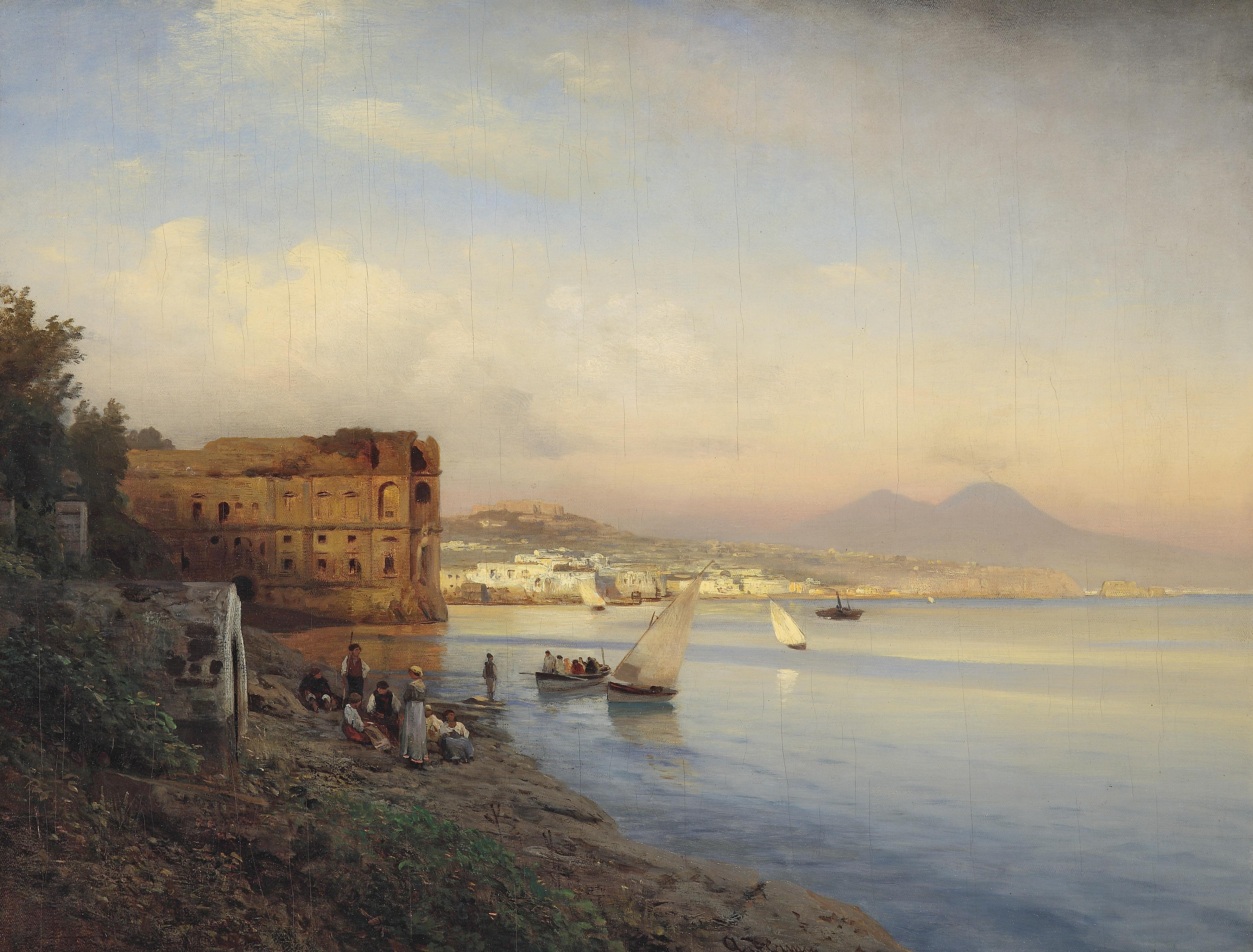 Blick auf die Bucht von Neapel mit dem Palast der Königin Johannalabel QS:Lde,"Blick auf die Bucht von Neapel mit dem Palast der Königin Johanna"